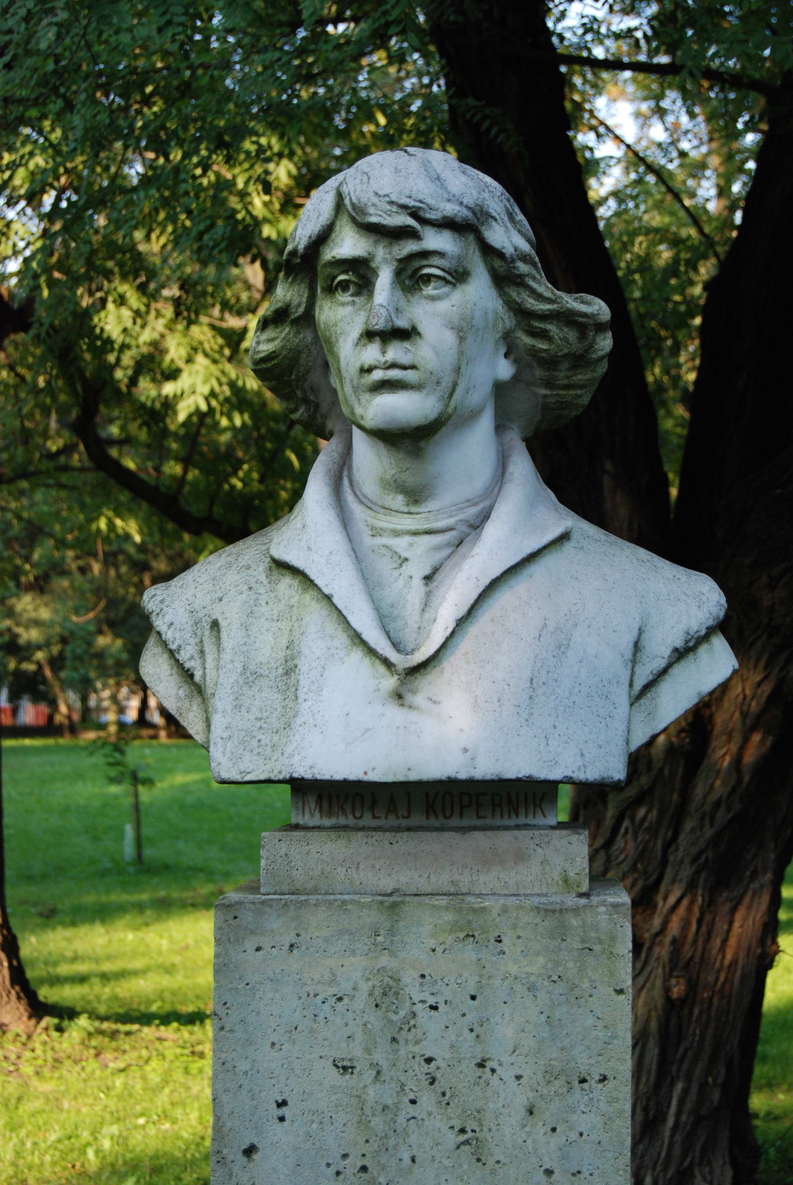 Pomnik Mikołaja Kopernika w Parku Jordana w Krakowie